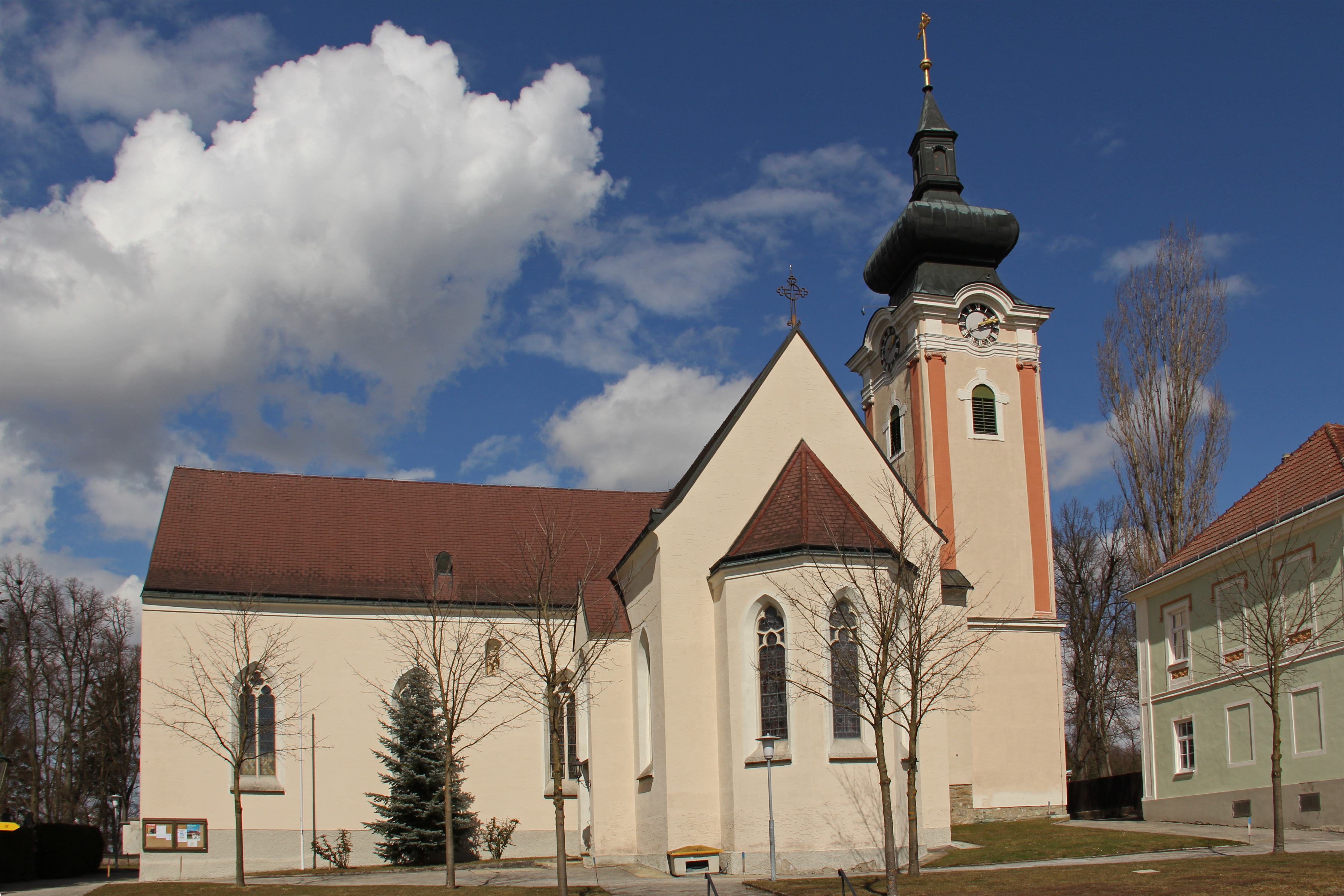 Die dem heiligen Ulrich geweihte Pfarrkirche von Allentsteig liegt gegenüber der Burg und ist von dieser durch den Burggraben getrennt.